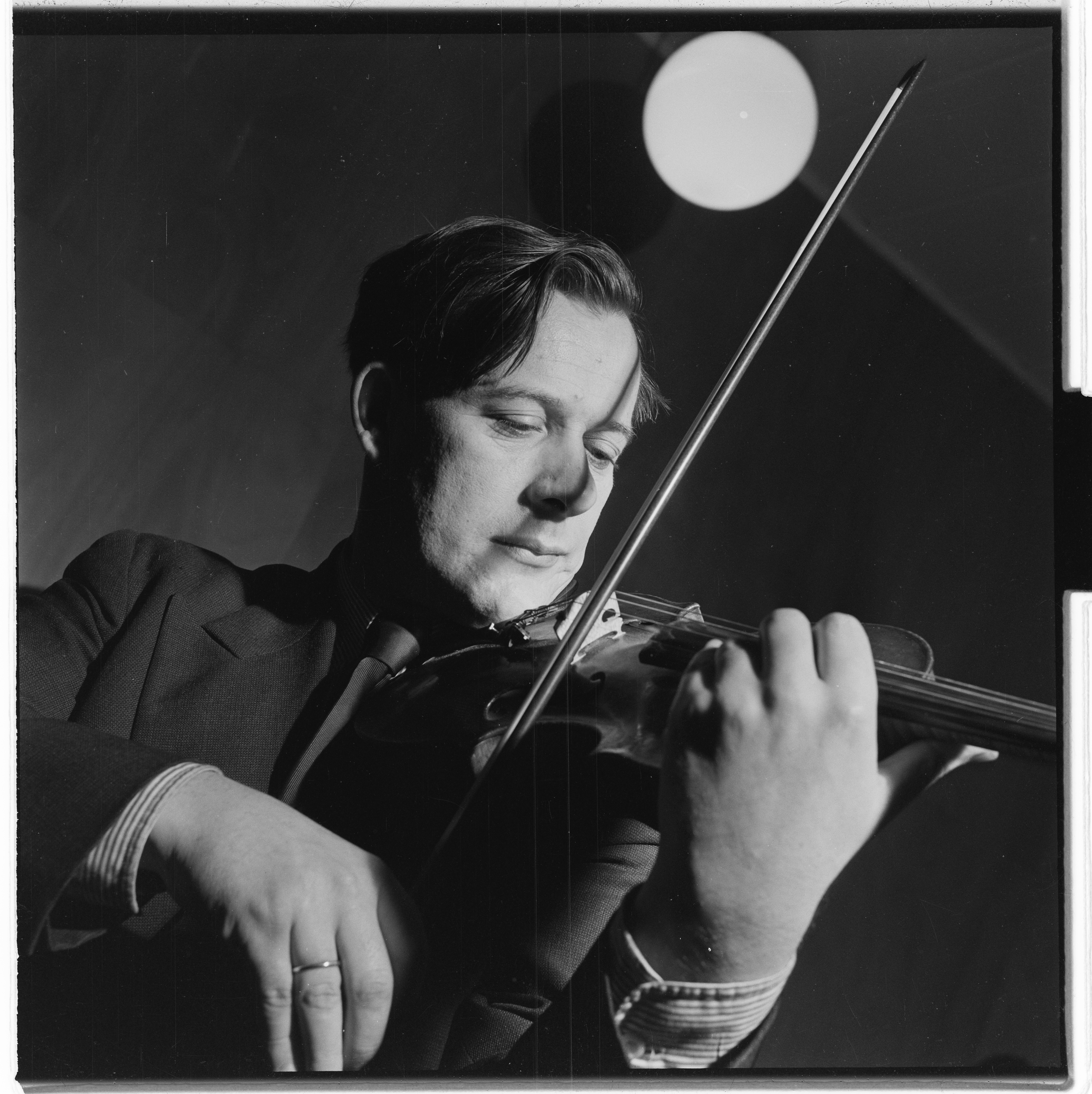 Bildet er hentet fra Arkivverket. Stavanger-ensemblet. NÅ nr. 3 Arkivinstitusjon : Riksarkivet Arkivnavn : Billedbladet NÅ Sted : Norge, Rogaland, Stavanger, Emneord: Ensembler, Musikere Avbildet